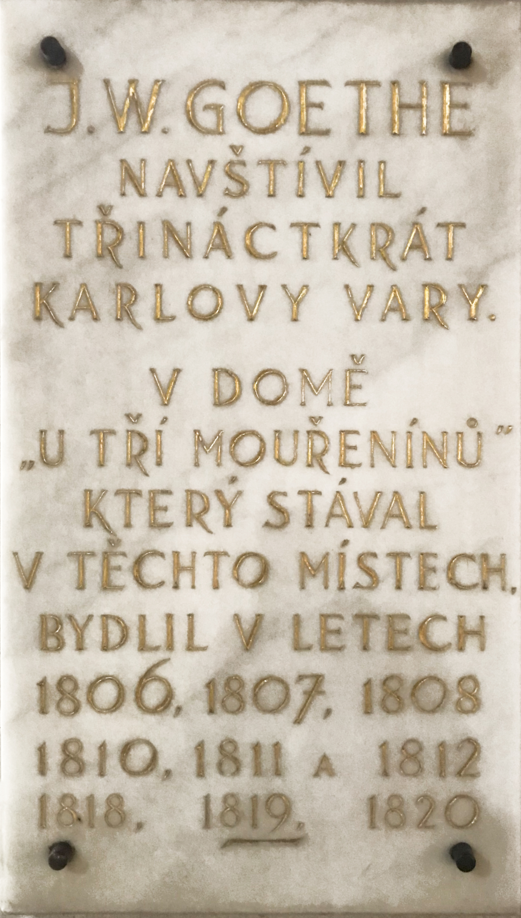 Pamětní deska na domě U Tří mouřenínů v Karlových Varech, kde původně stával dům, ve kterém pobýval J. W. Goethe